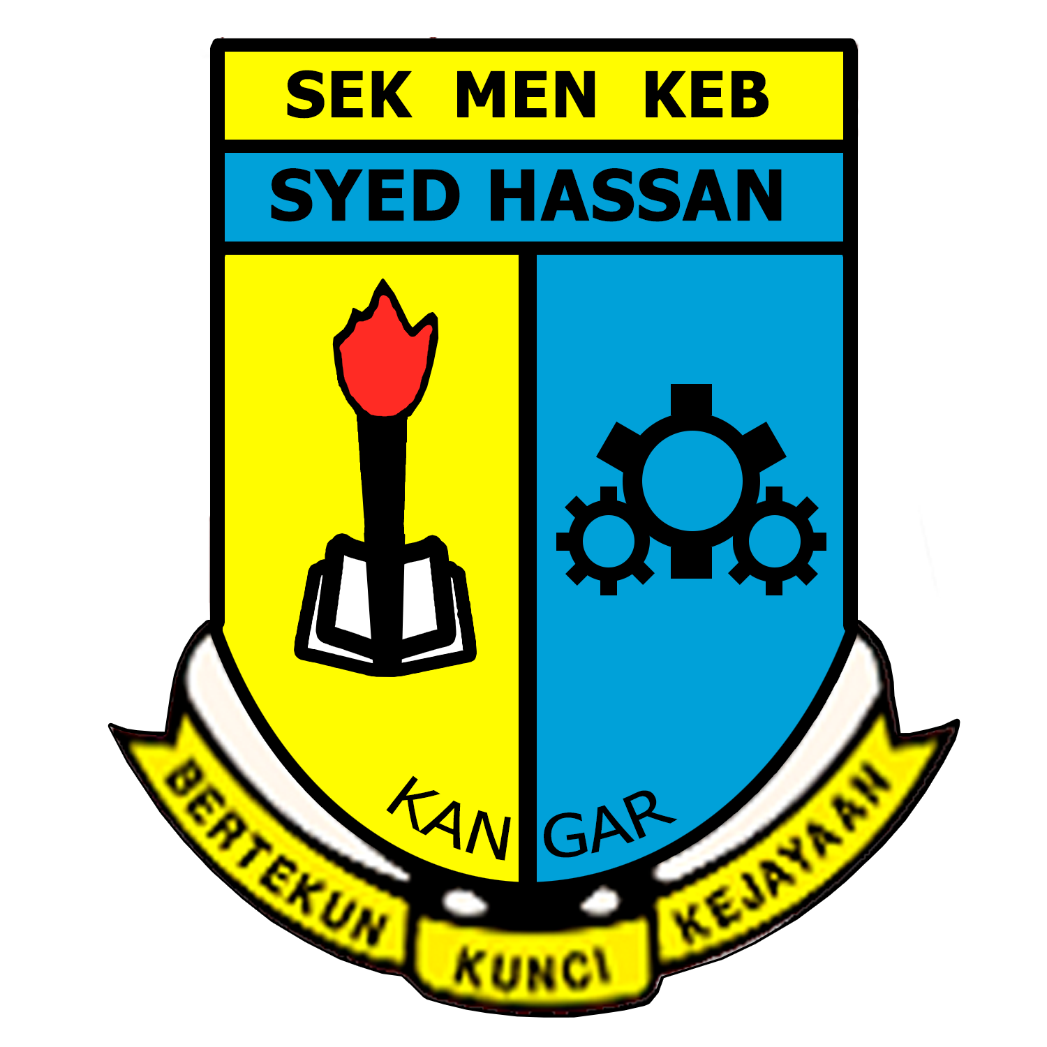 Logo SMK Syed Hassan